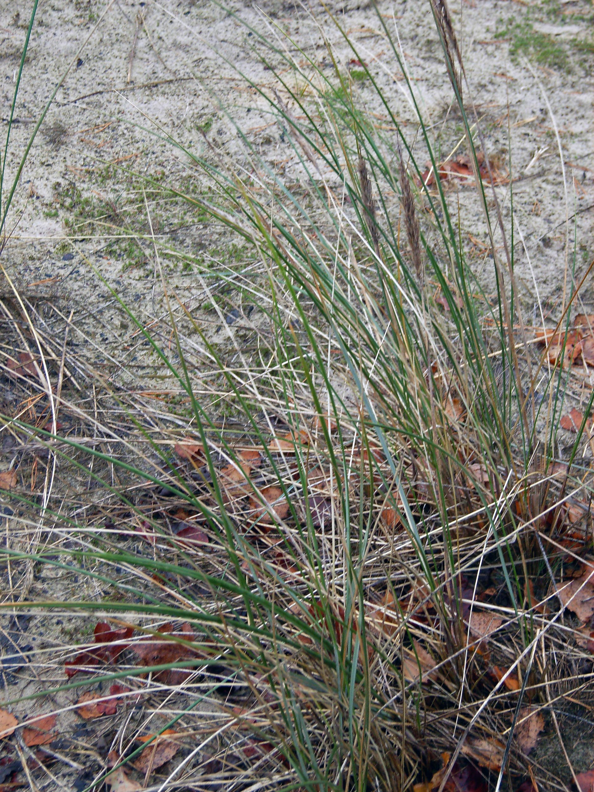 Ammophila arenaria; LK Rothenburg, Niedersachsen